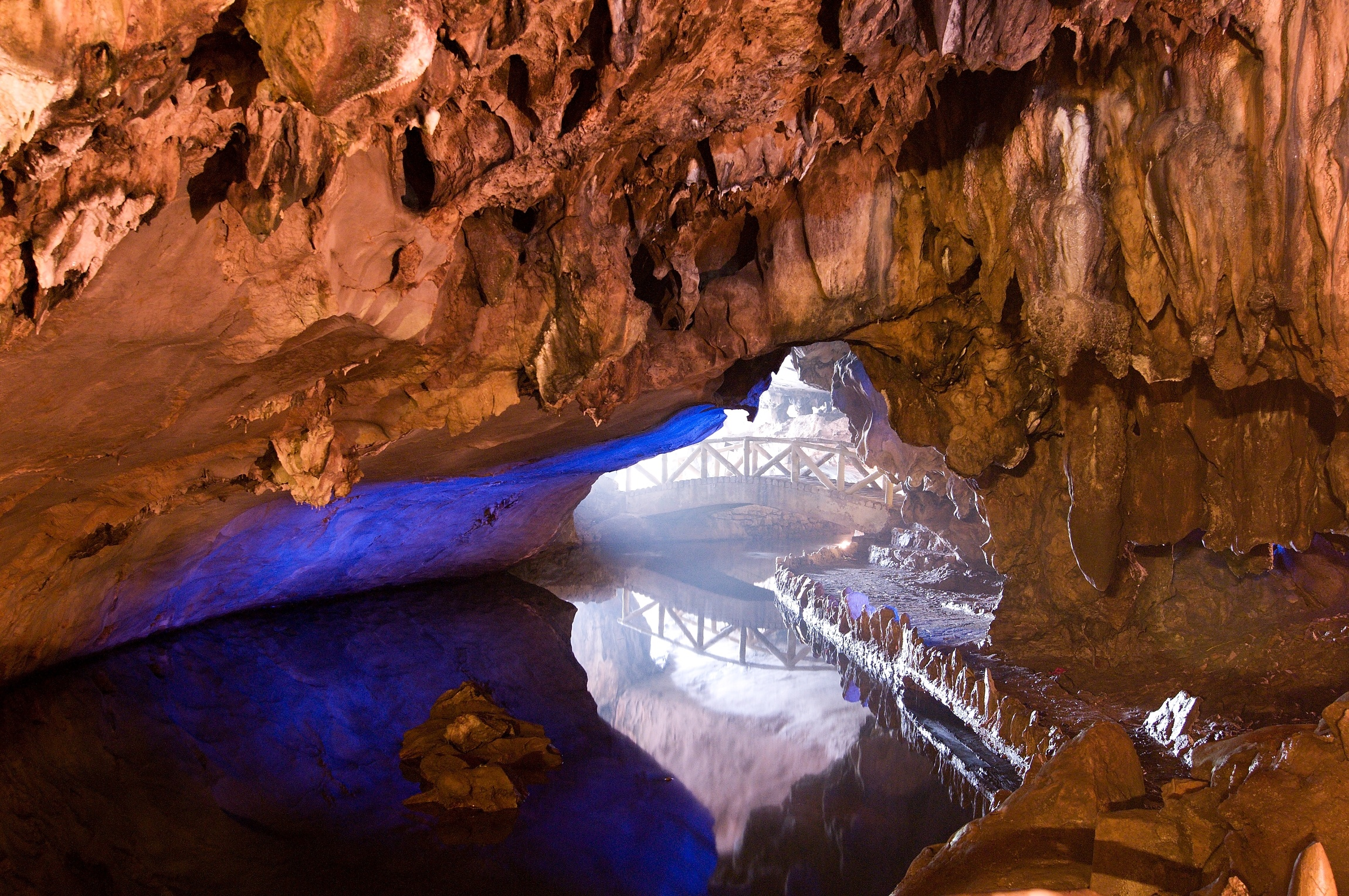 Photograph by Topi Pigula